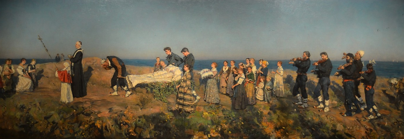 tableau de Francesco Paolo Michetti